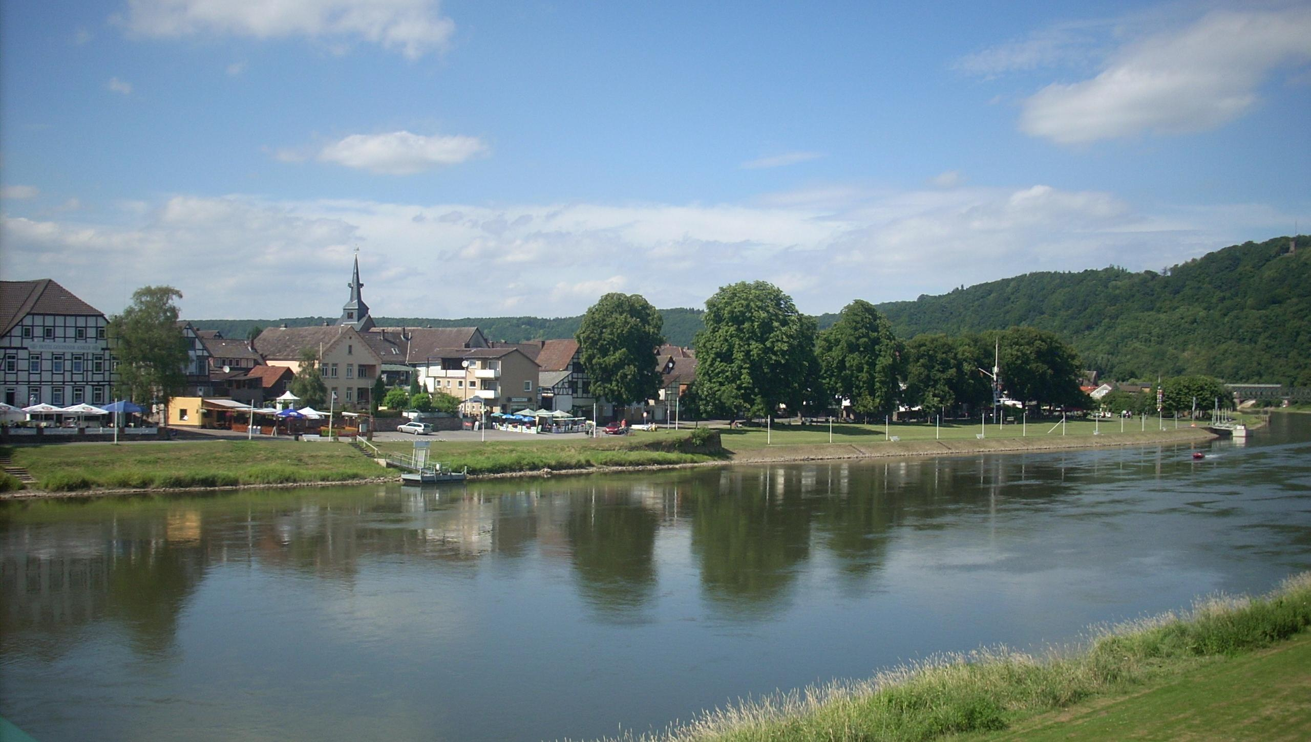 Bodenwerder, Landkreis Holzminden, Niedersachsen